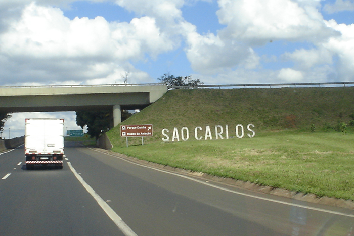 Placa de entrada da cidade de São Carlos.